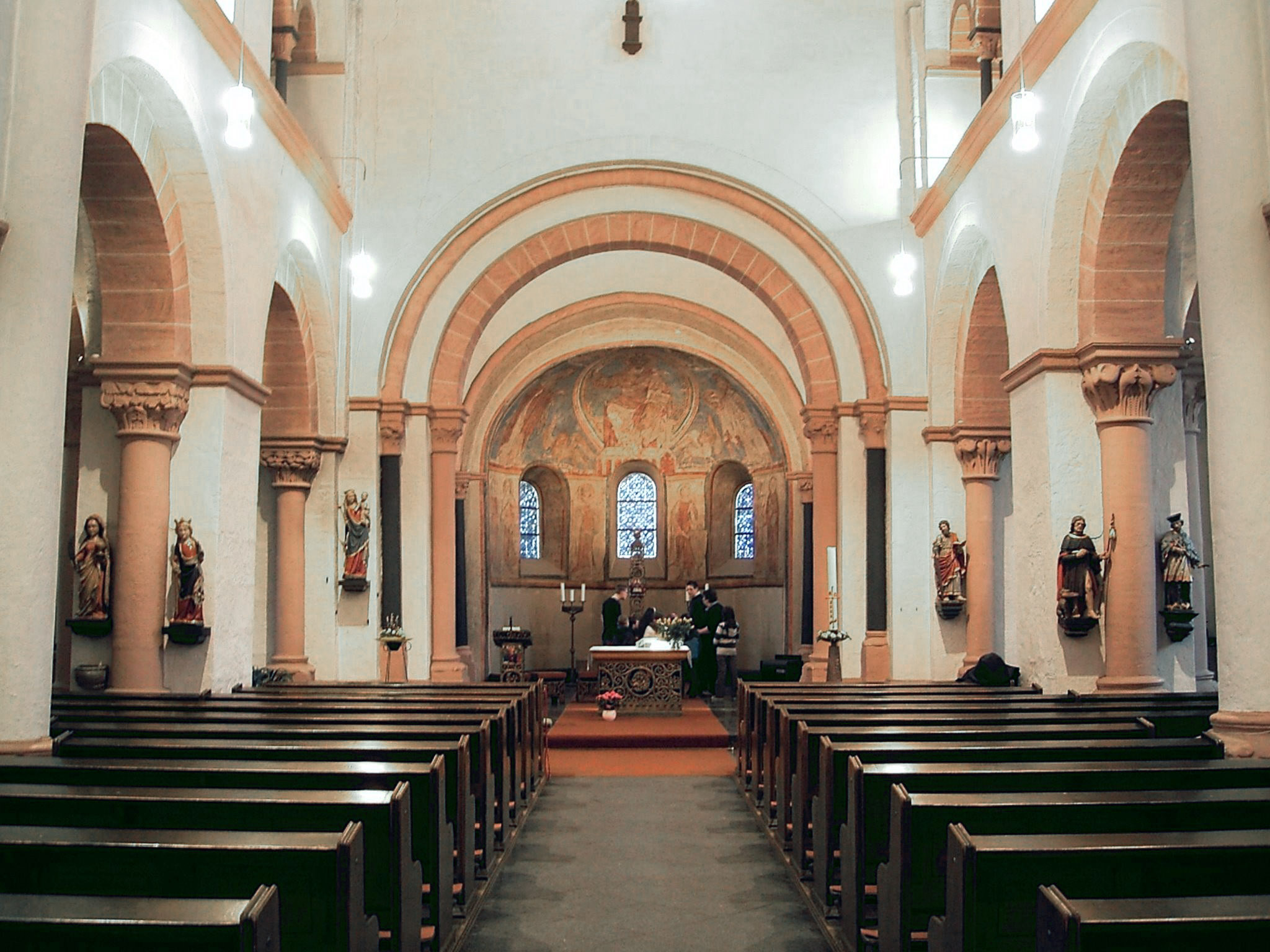 Nideggen, Sankt Johannes Baptist